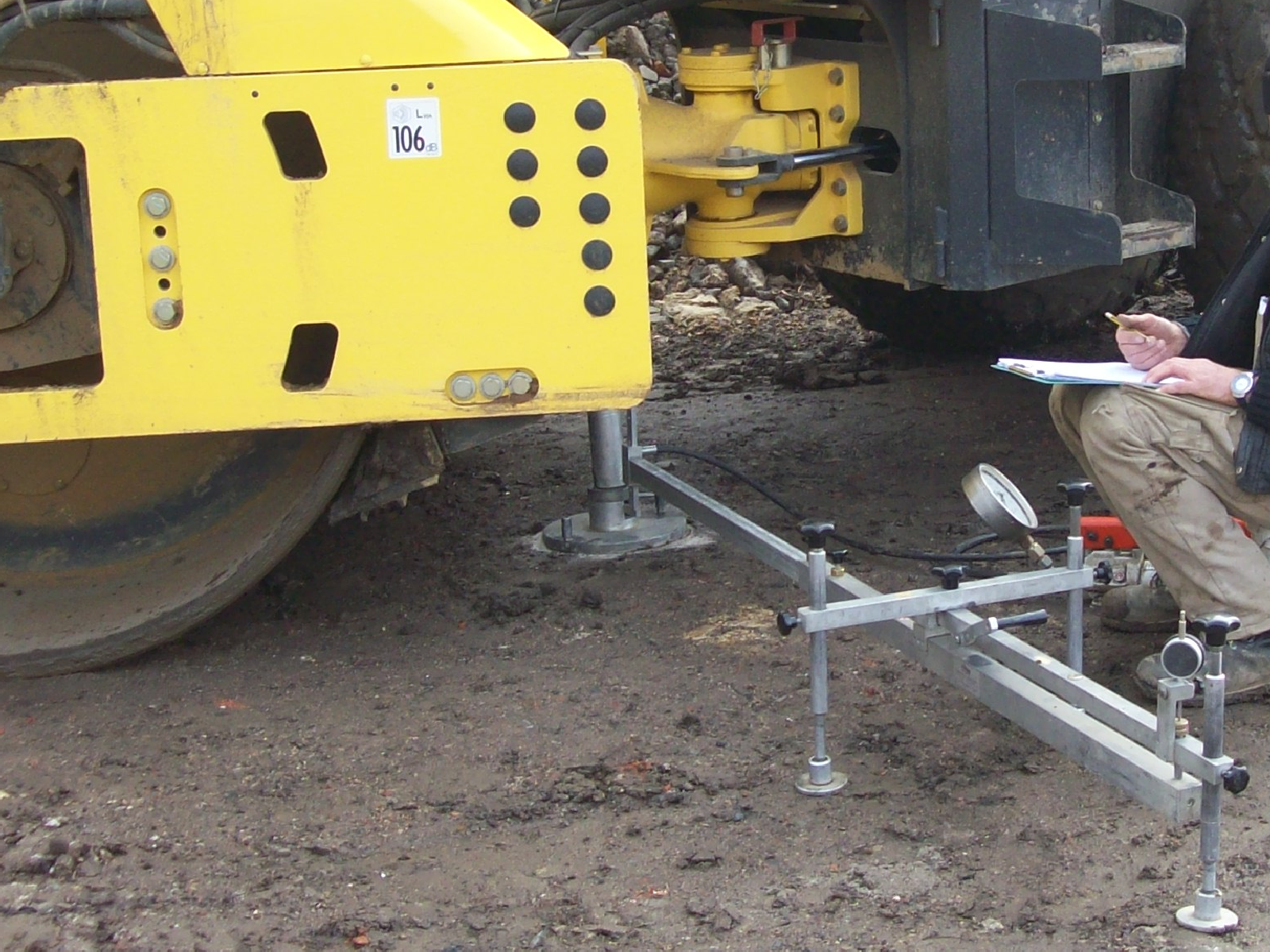 Lastplattendruckversuch. Als Gegengewicht dient ein Walzenzug.